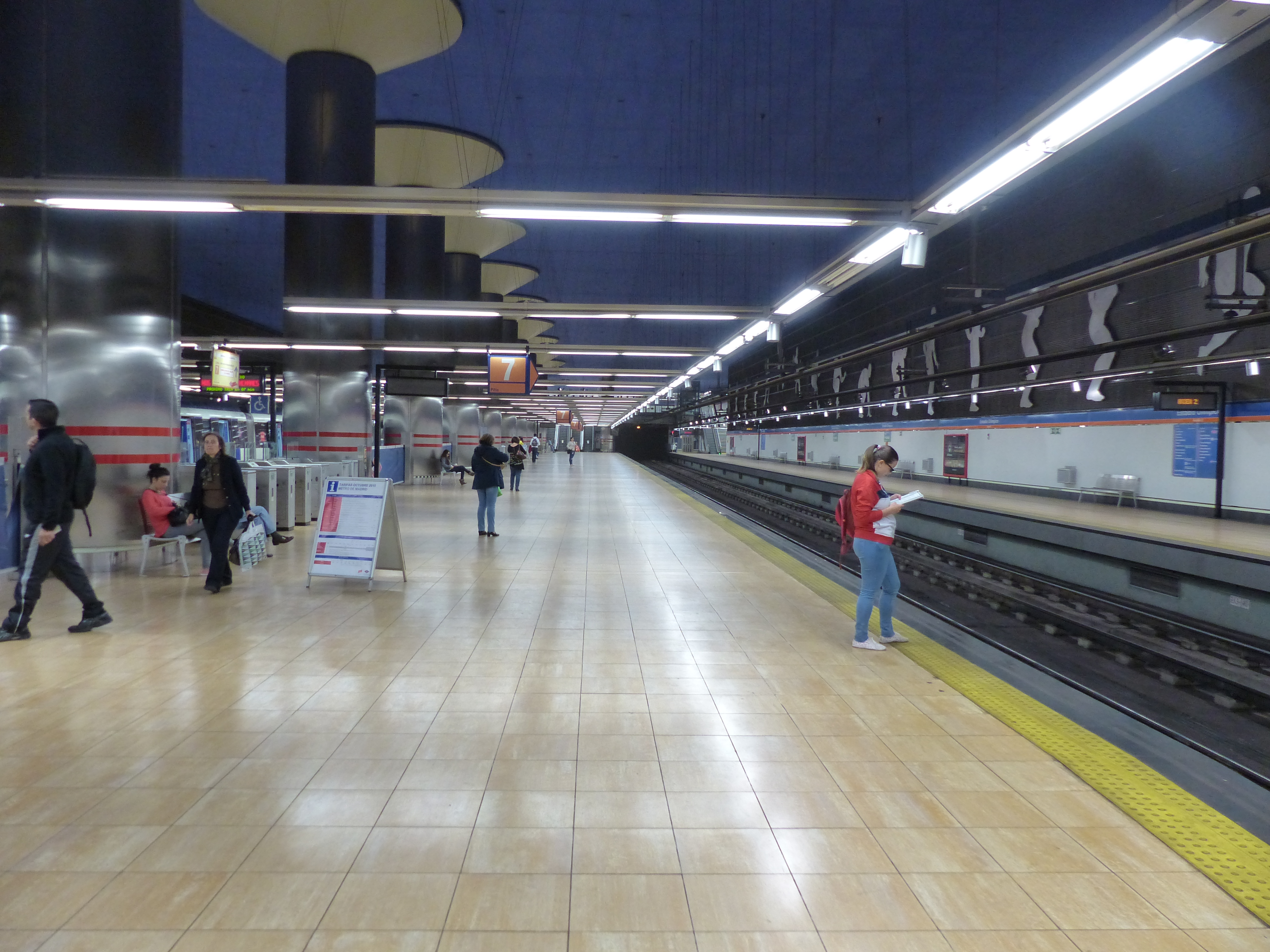 Andén dirección Barrio del puerto con gente, Estación Estadio Olímpico, Línea 7.